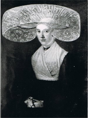 Marike Everts Wendelaar (1764-1804) posthuum in pastel getekend door haar zoon Sjoerd Bonga 1800-1864. Met Duitse muts.